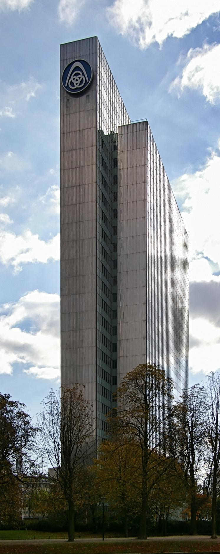 Thyssen-Haus in Düsseldorf, Sicht vom Hofgarten aus.